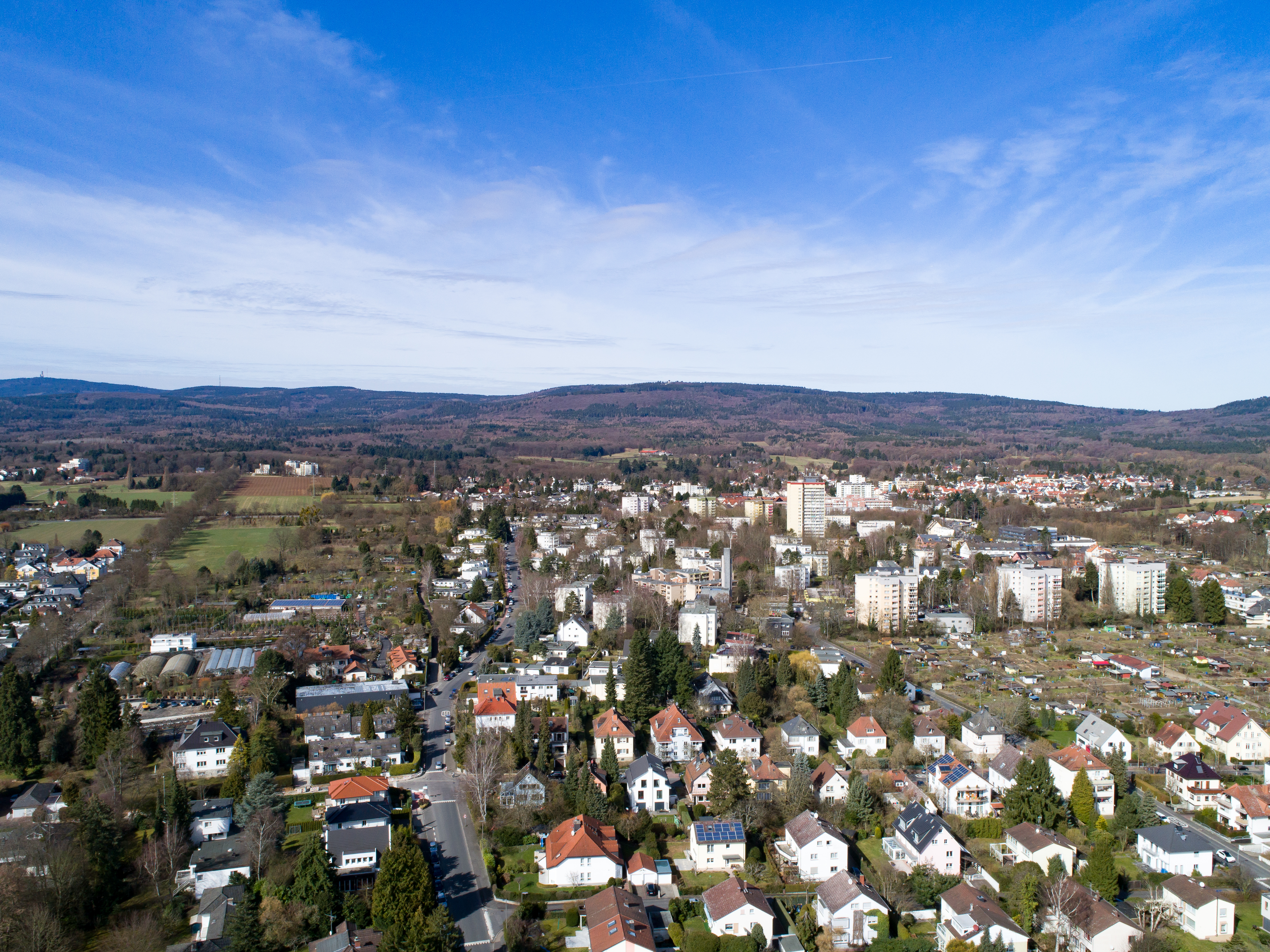 Luftbild von Bad Homburg vor der Höhe, im Vordergrund Gartenfeldsiedlung, im Hintergrund der Taunuskamm mit Großem Feldberg, Kolbenberg, Herzberg und Saalburgpass